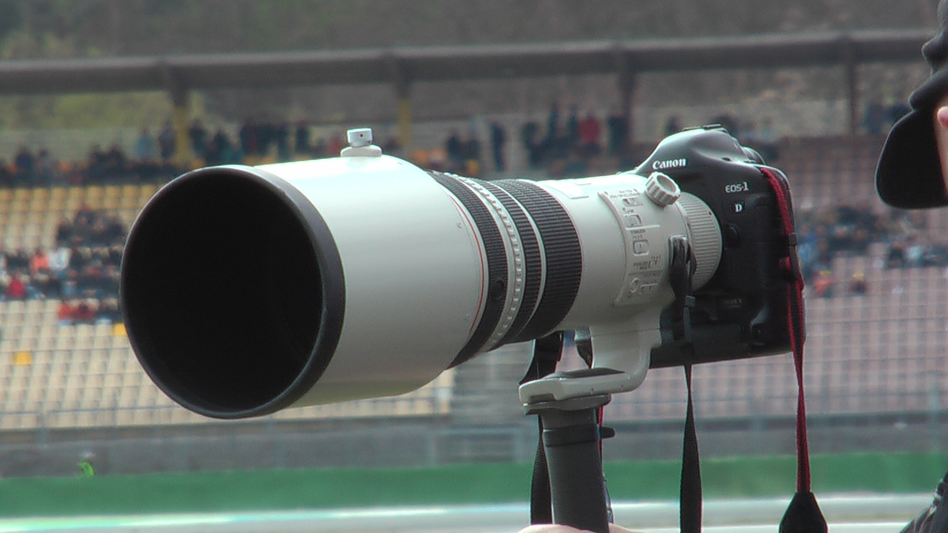 Kamera: Canon EOS 1D (etwa 4000 Euro)Objektiv: Canon EF 500mm 4 L IS USM (etwa 5000 Euro) Mit dieser Ausrüstung kann ja jeder tolle Fotos machen ;-)Ich hab die meisten Bilder mit der Videokamera (Panasonic HDC-SD5) gemacht !!!Hatte leider kein Tele-Objektiv dabei.